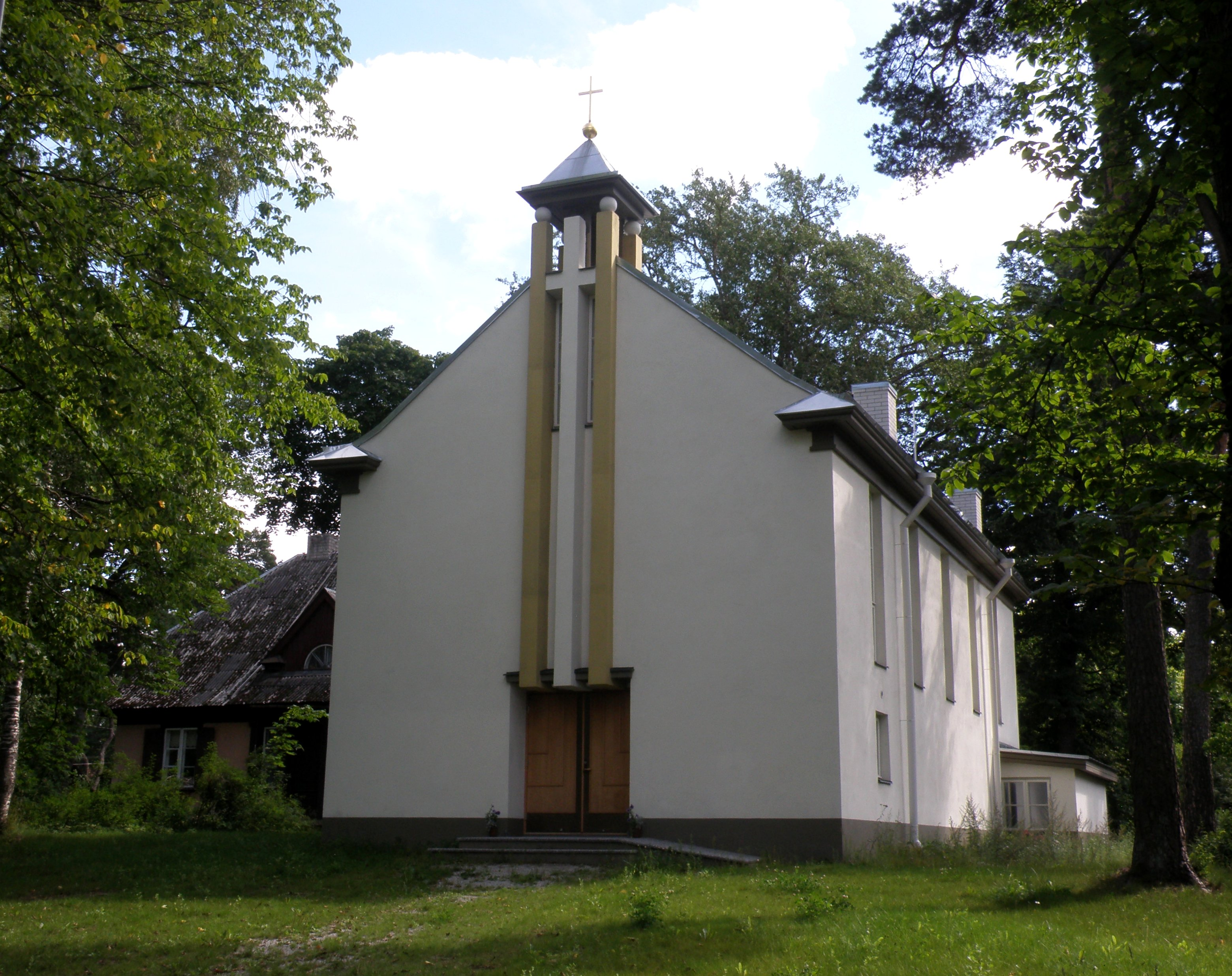 Nõmme Saksa Lunastaja koguduse palvela